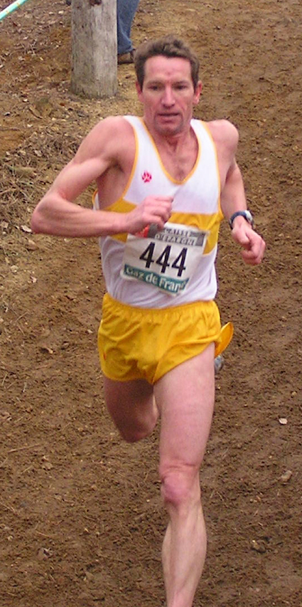 Cross-country